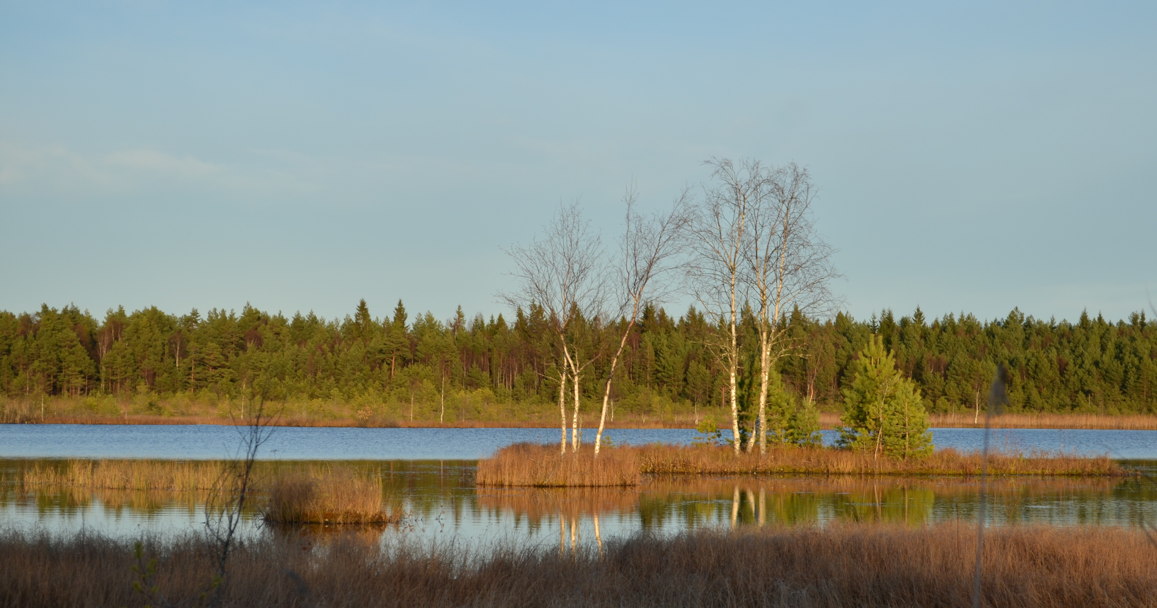 Harjumaa, Orkjärve looduskaitseala